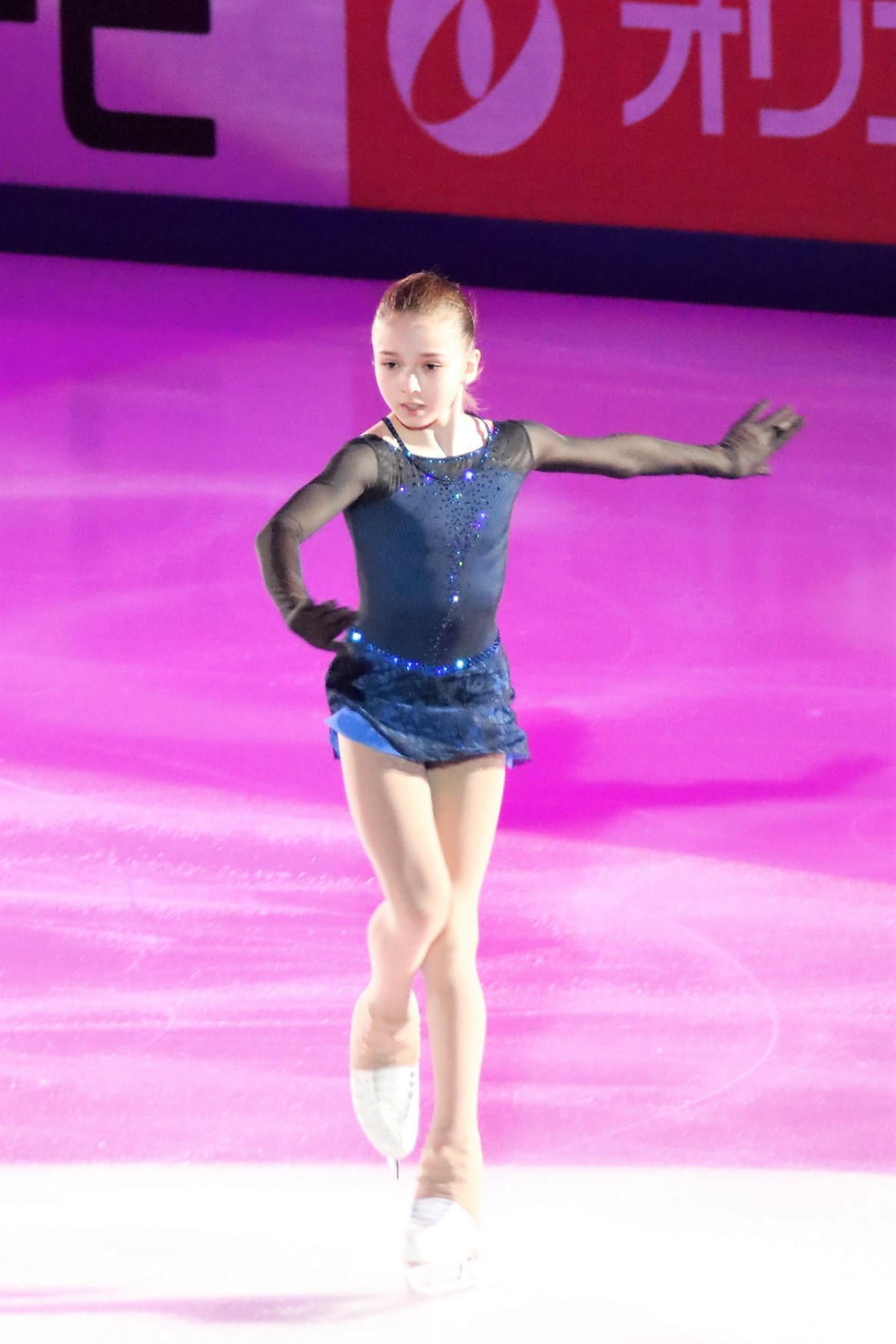 Камила Валиева на показательных выступлениях Rostelecom Cup 2018